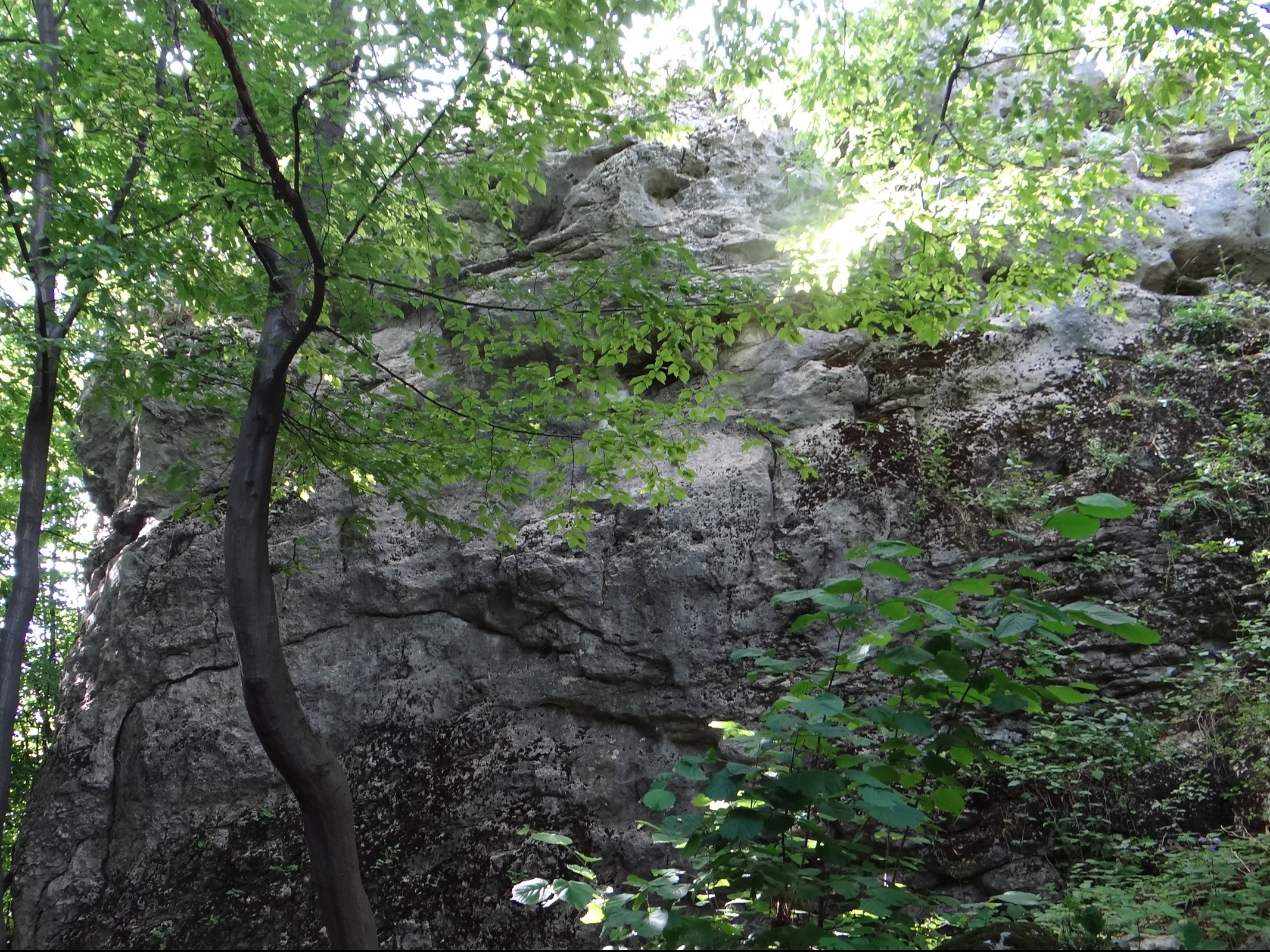 Rozłupana (Pomorzańskie Skałki)